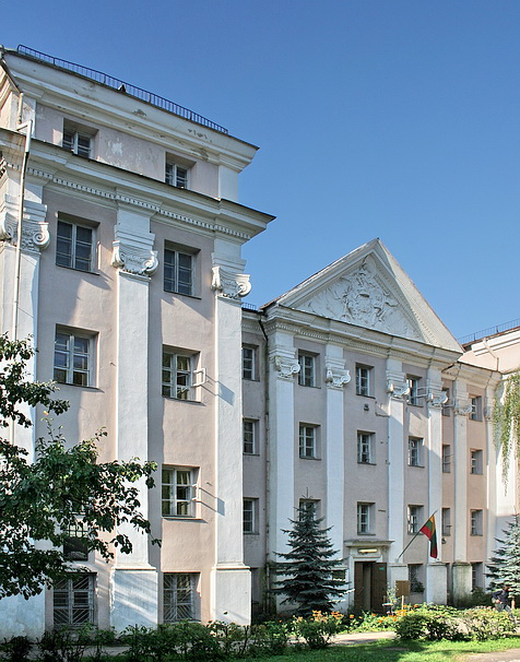 Slushko Palace (Sluškų rūmai) in Vilnius